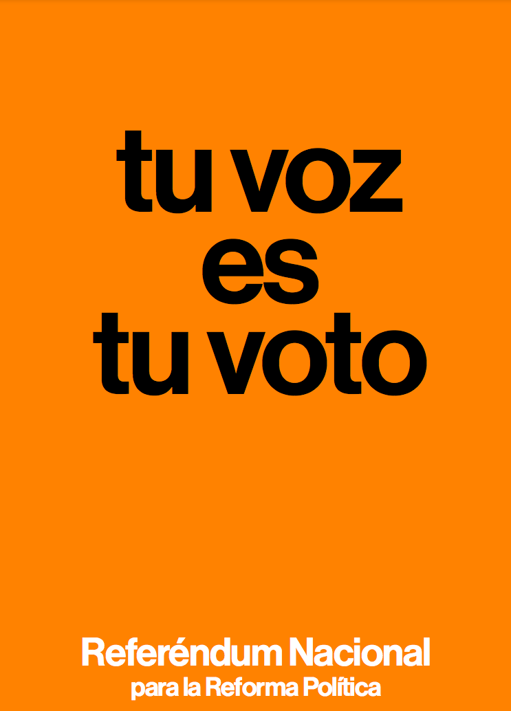 Reproducción del cartel del Referéndum para la Ley de la Reforma Política de 1976.